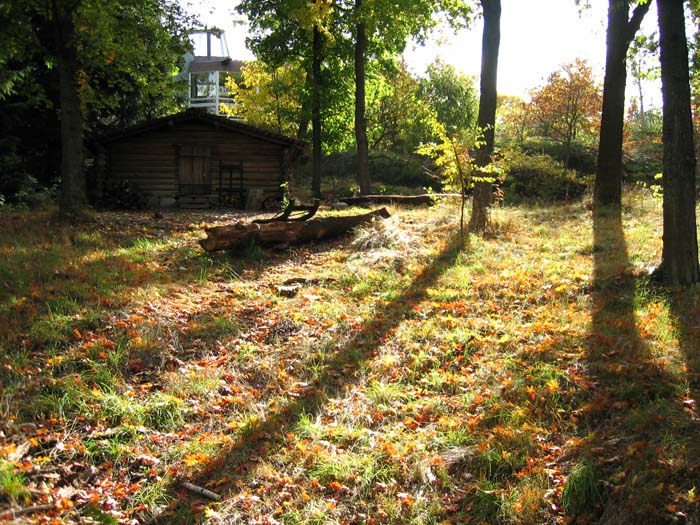 A 19th century shaft (Skogsarbetarkoja) at Skansen, Stockholm.